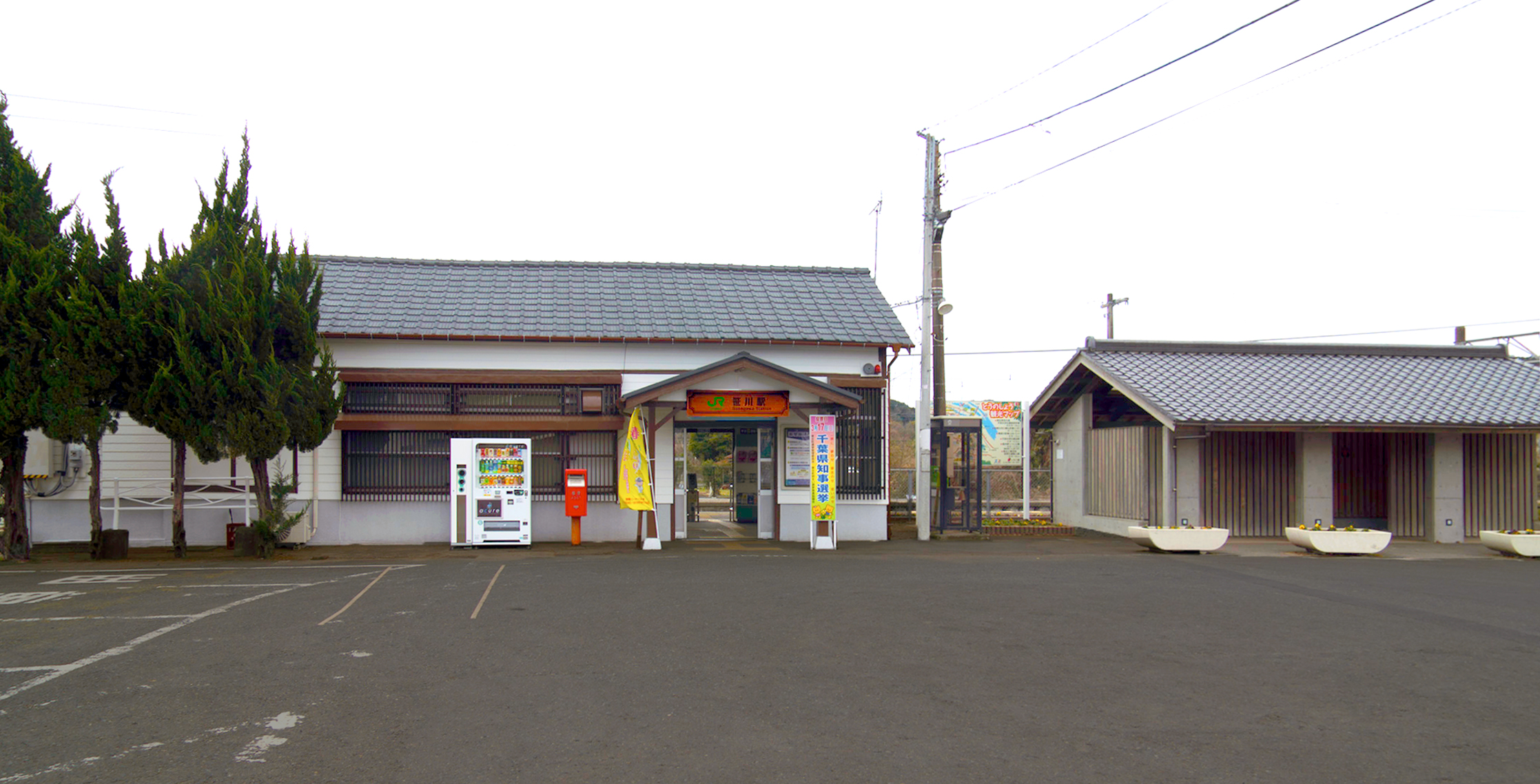 東日本旅客鉄道株式会社成田線笹川駅駅舎（リニューアル後）